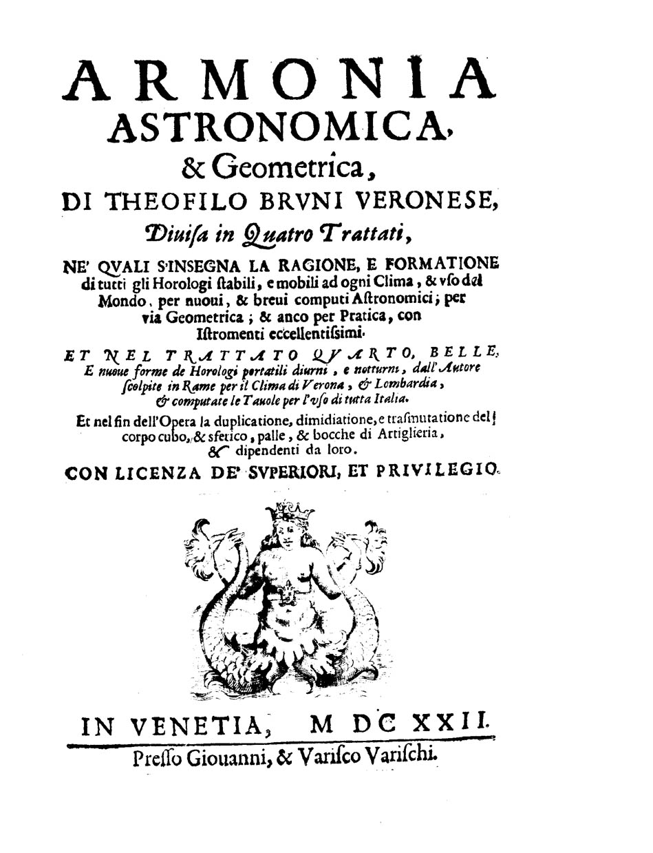 Armonia astronomica, & geometrica, di Theofilo Bruni veronese, diuisa in quattro trattati, ne' quali s'insegna la ragione, e formatione di tutti gli horologi stabili ... Et nel trattato quarto, belle, e nuoue forme de horologi portatili diurni ... Et nel fin dell'opera la duplicatione, dimidiatione, e trasmutatione del corpo cubo, …. - In Venetia : presso Giouanni e Varisco Varischi, 1622. - [12], 64, 55, [1], 54, 60, [8] p., [3] c. di tav. ripiegate : ill. ; 4º .